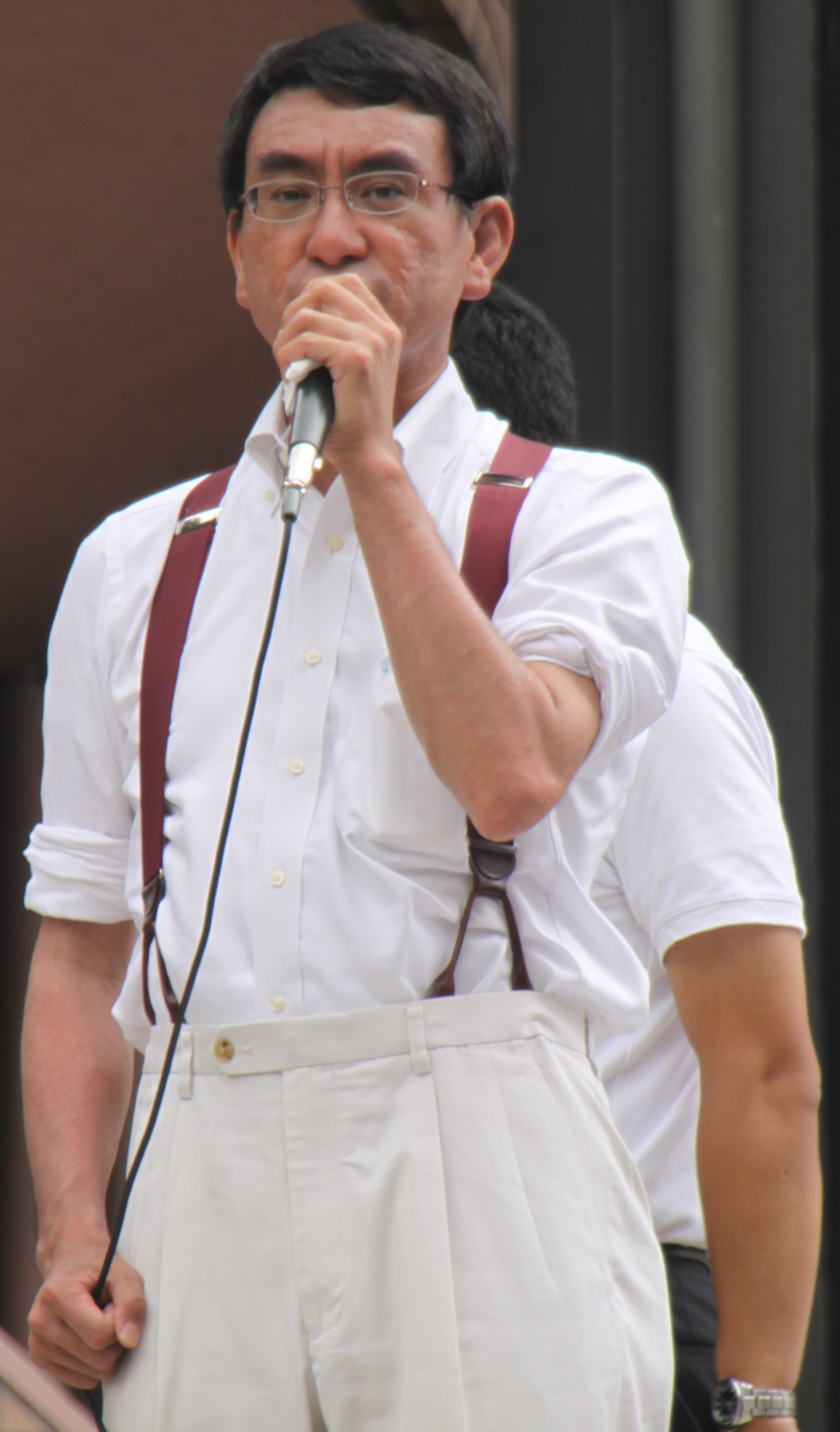 Tarō Kōno、河野太郎